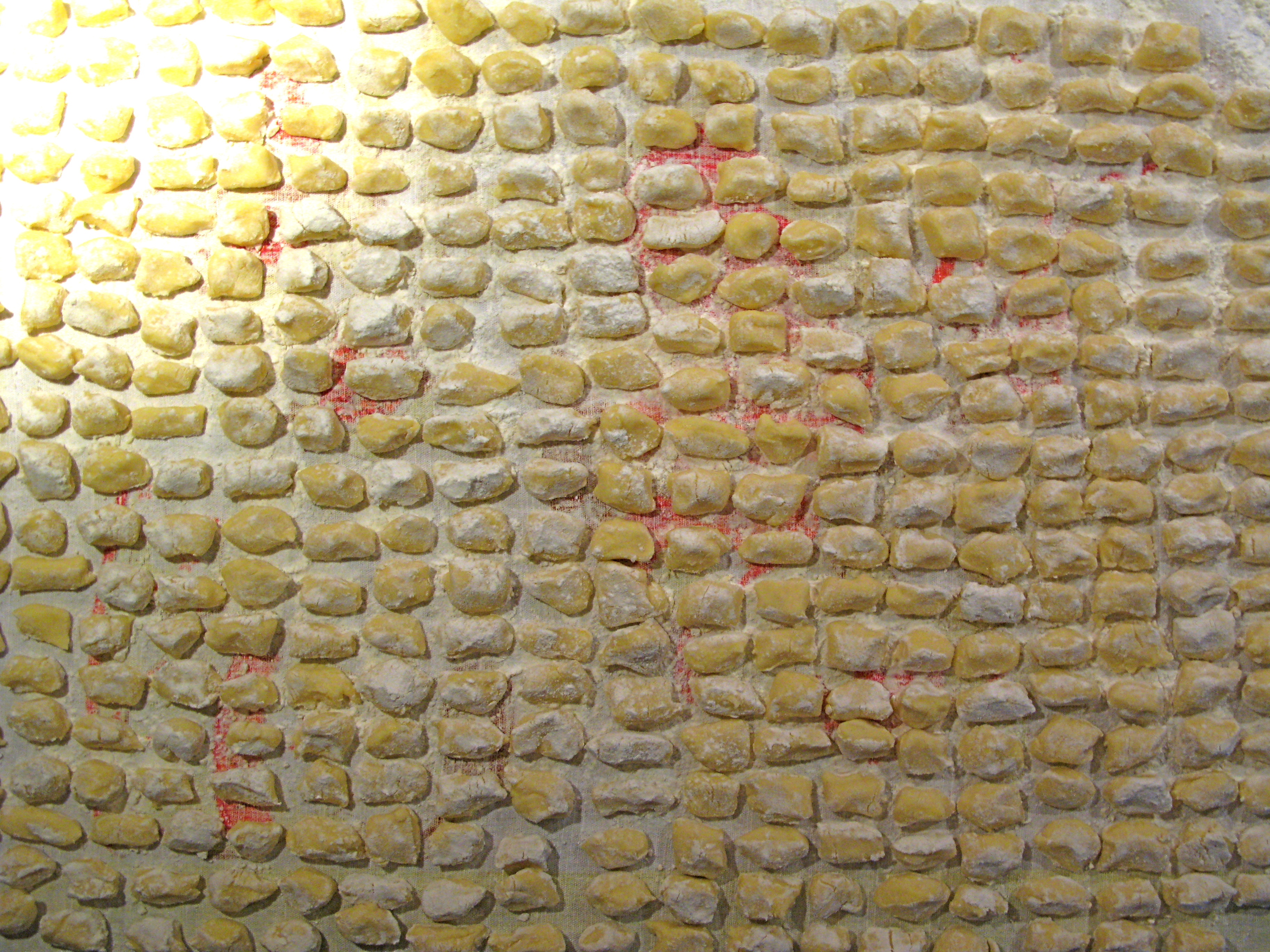 gnocchi of potatoes